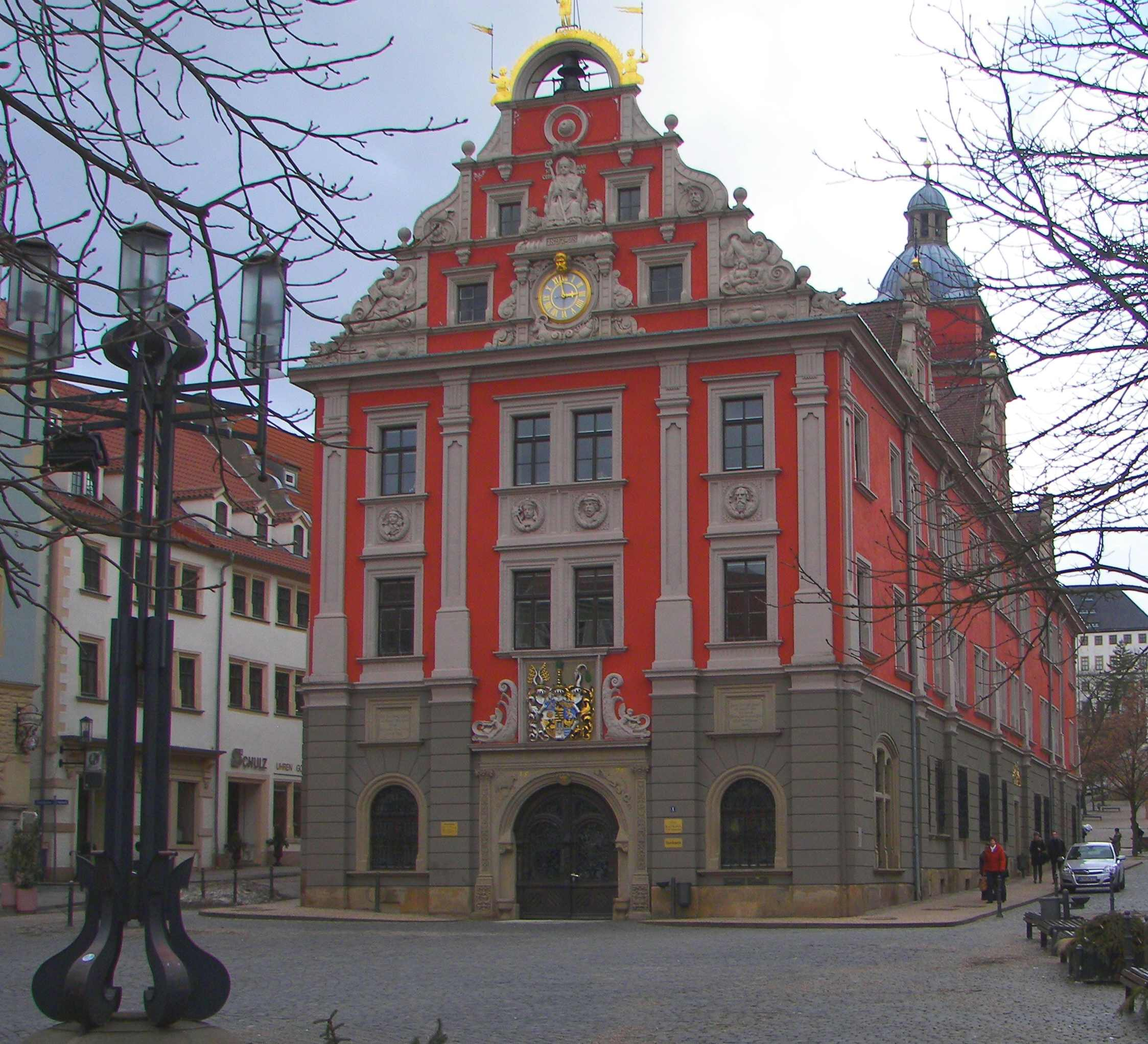 Das historische Rathaus von Gotha auf dem Hauptmarkt